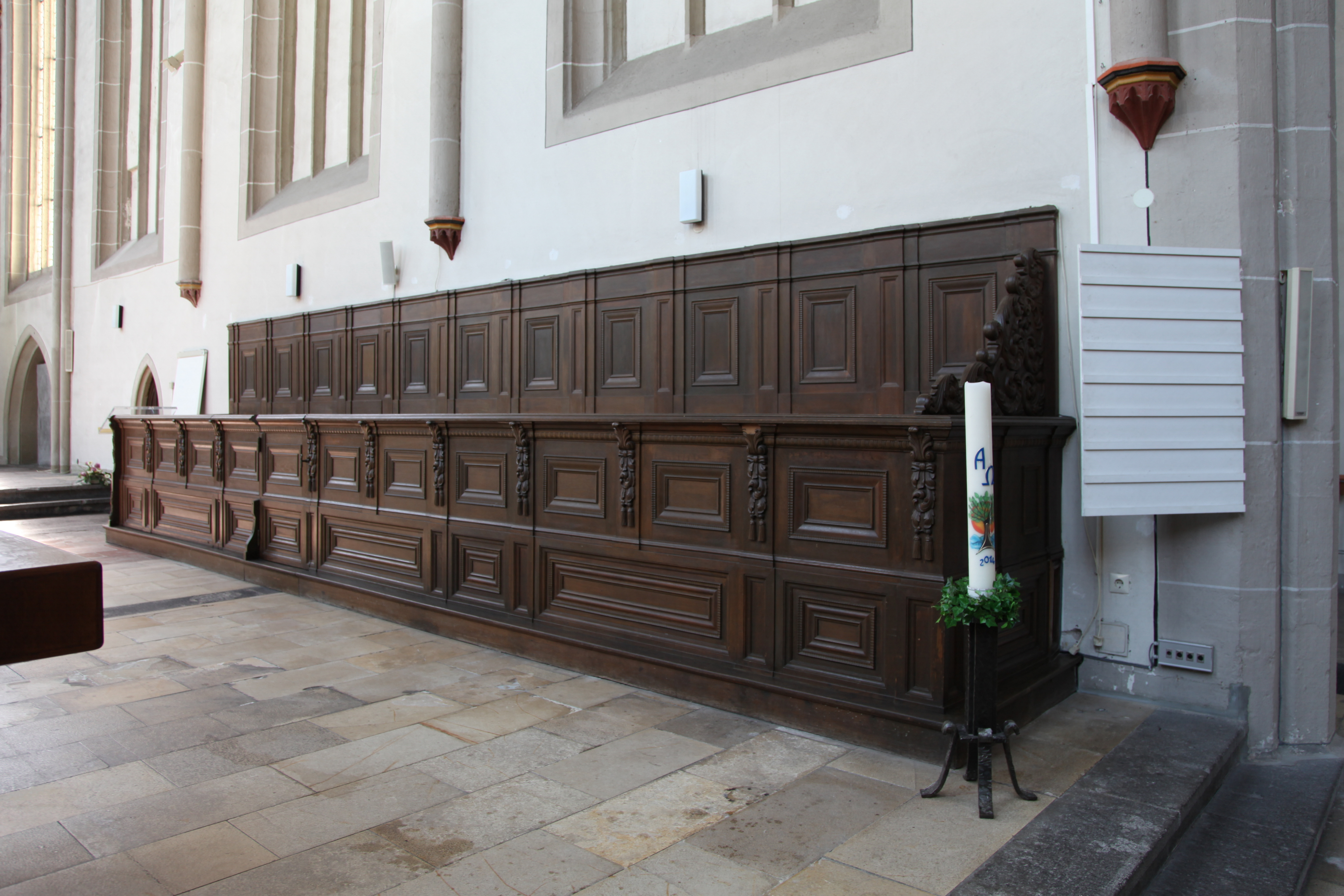 Christuskirche, Ecke Hochstraße/Läufstraße in Andernach